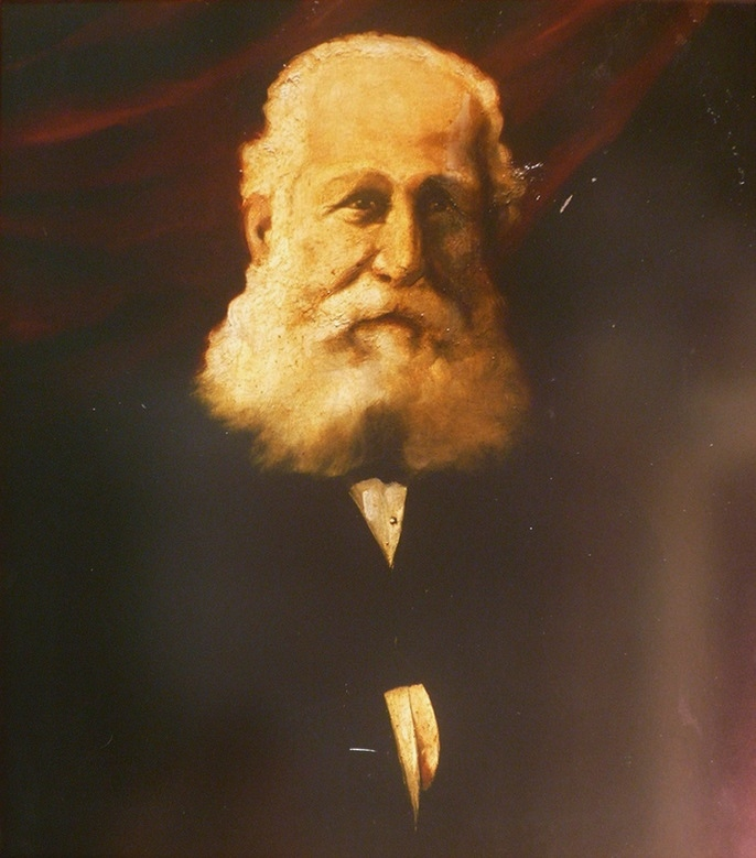 António_Augusto_Carvalho_Monteiro.jpg (1848-1920), also known as "Monteiro dos Milhões" »» Upload by [...influenciou e determinou, parte bastante razoável do mistério sombólico e iconográfico do palácio que construiu na sua quinta, situada na encosta da serra de Sintra, o Palácio da Regaleira